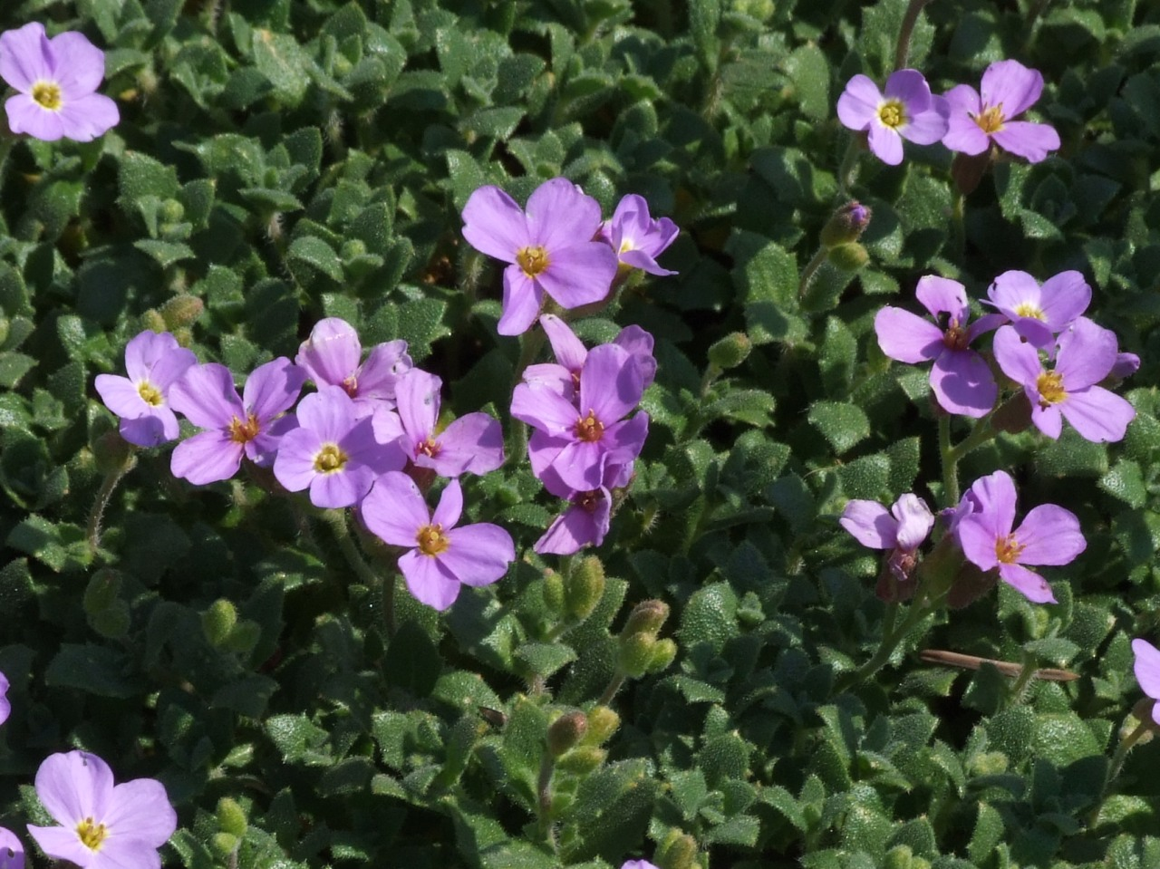 Aubrieta kotschyi